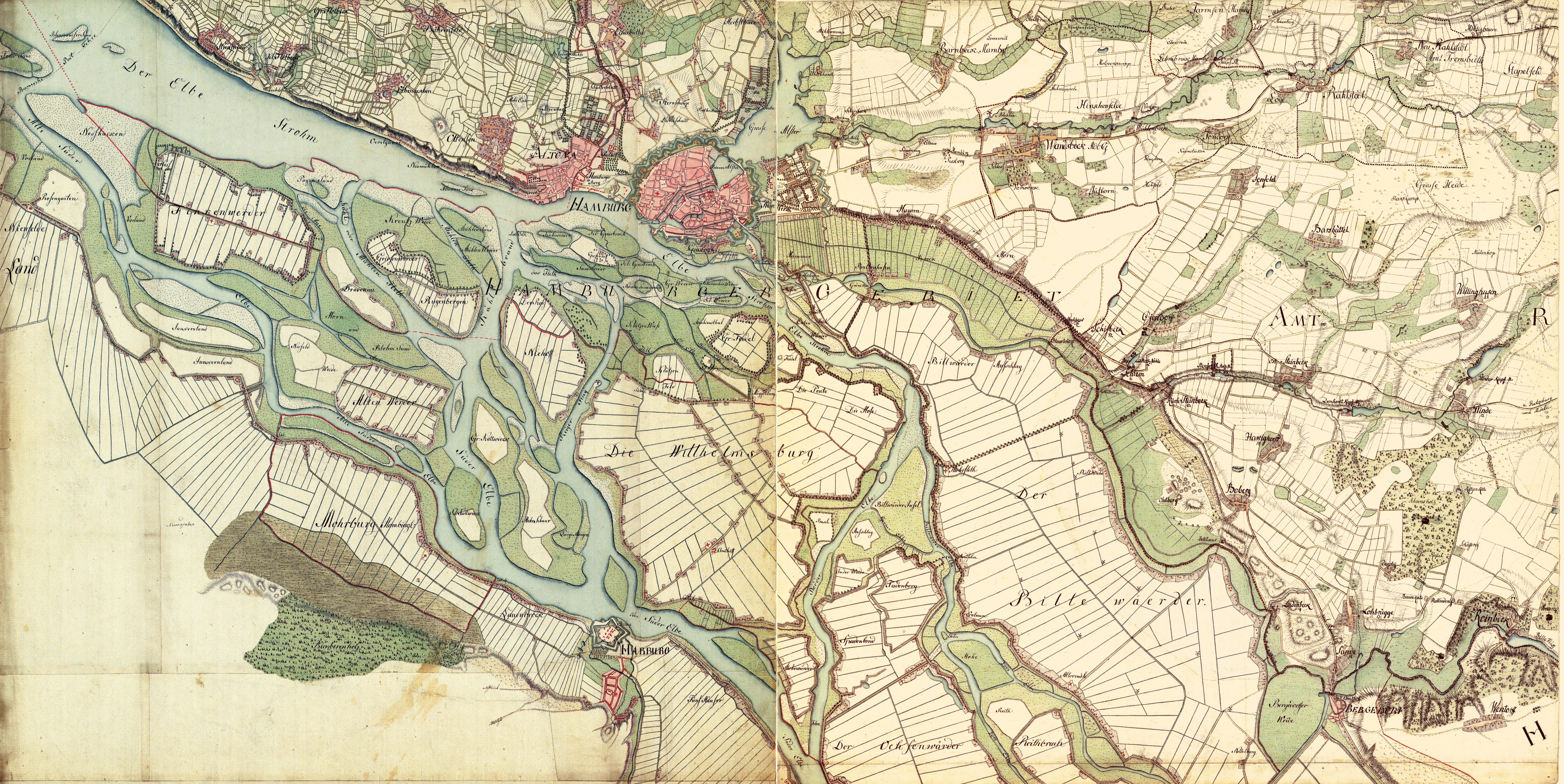 Altona, Hamburg, Harburg. Aufgenommen in den Jahren 1789 bis 1796 unter der Direktion des Majors Gustav Adolf von Varendorf durch Offiziere des Schleswigschen Infanterieregiments Bergedorf, Reinbek. Aufgenommen in den Jahren 1789 bis 1796 unter der Direktion des Majors Gustav Adolf von Varendorf durch Offiziere des Schleswigschen Infanterieregiments